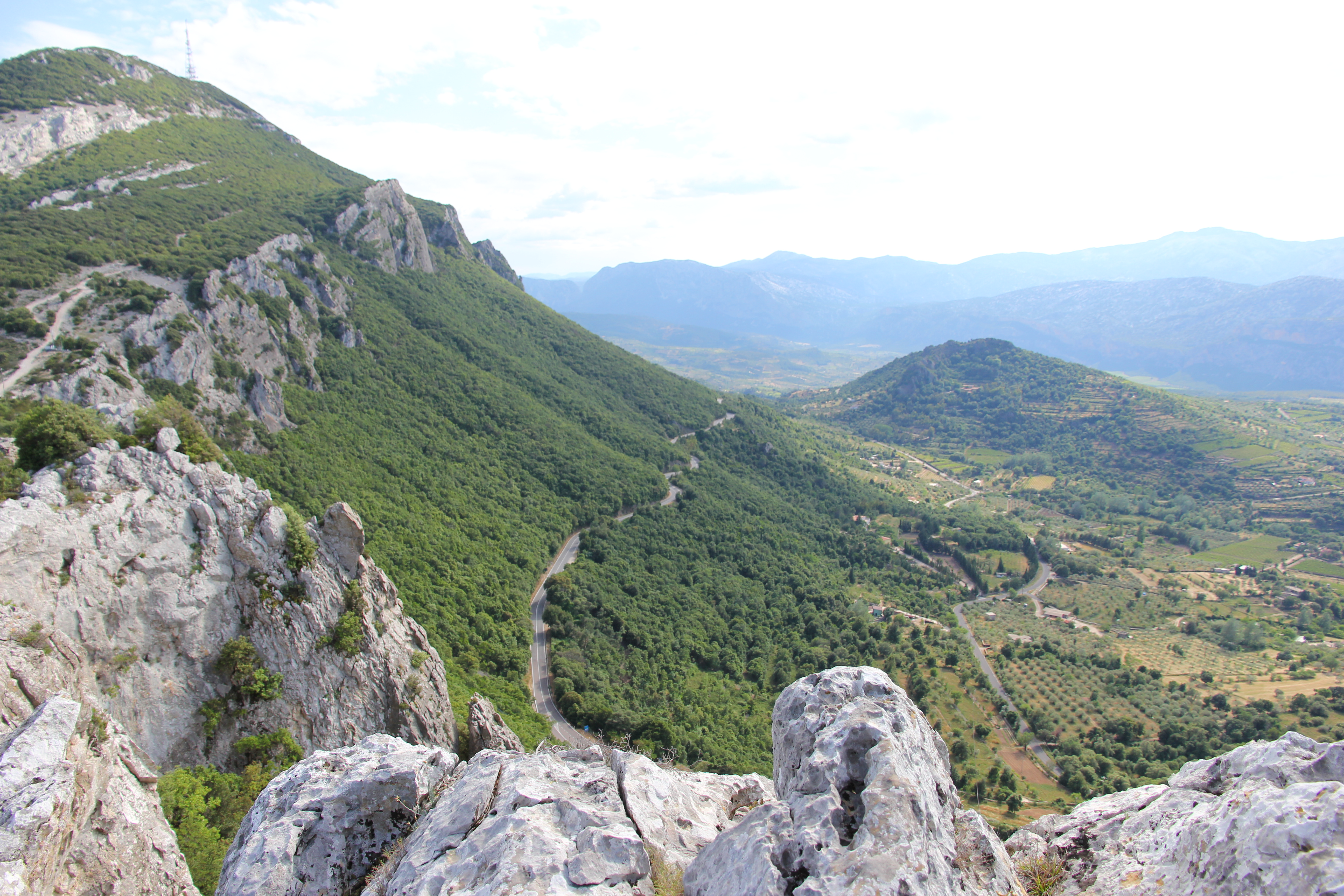 Cala Gonone (Dorgali)